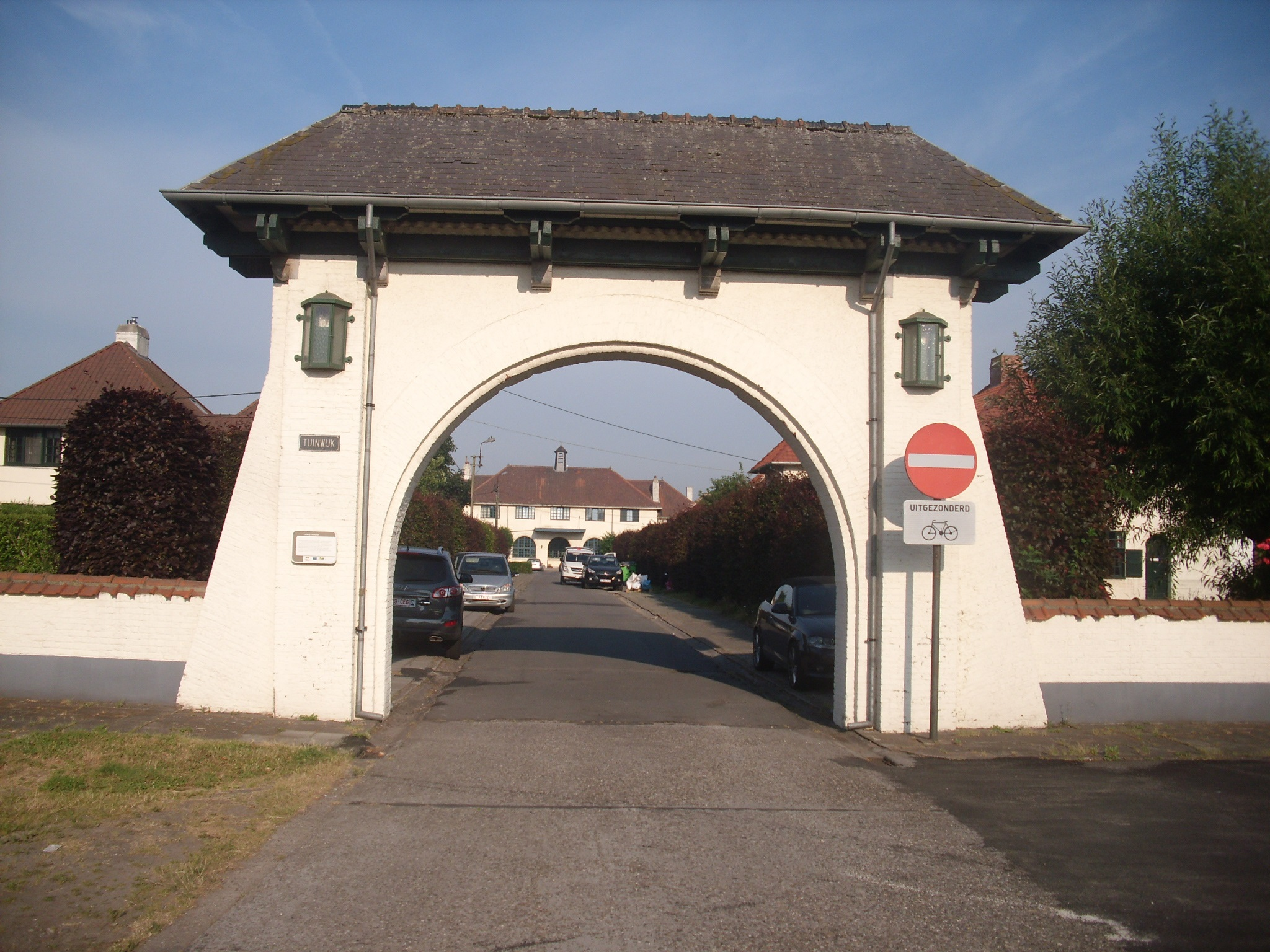 Toegangspoort tot Herryville - Langerbrugge - Evergem - Oost-Vlaanderen - België